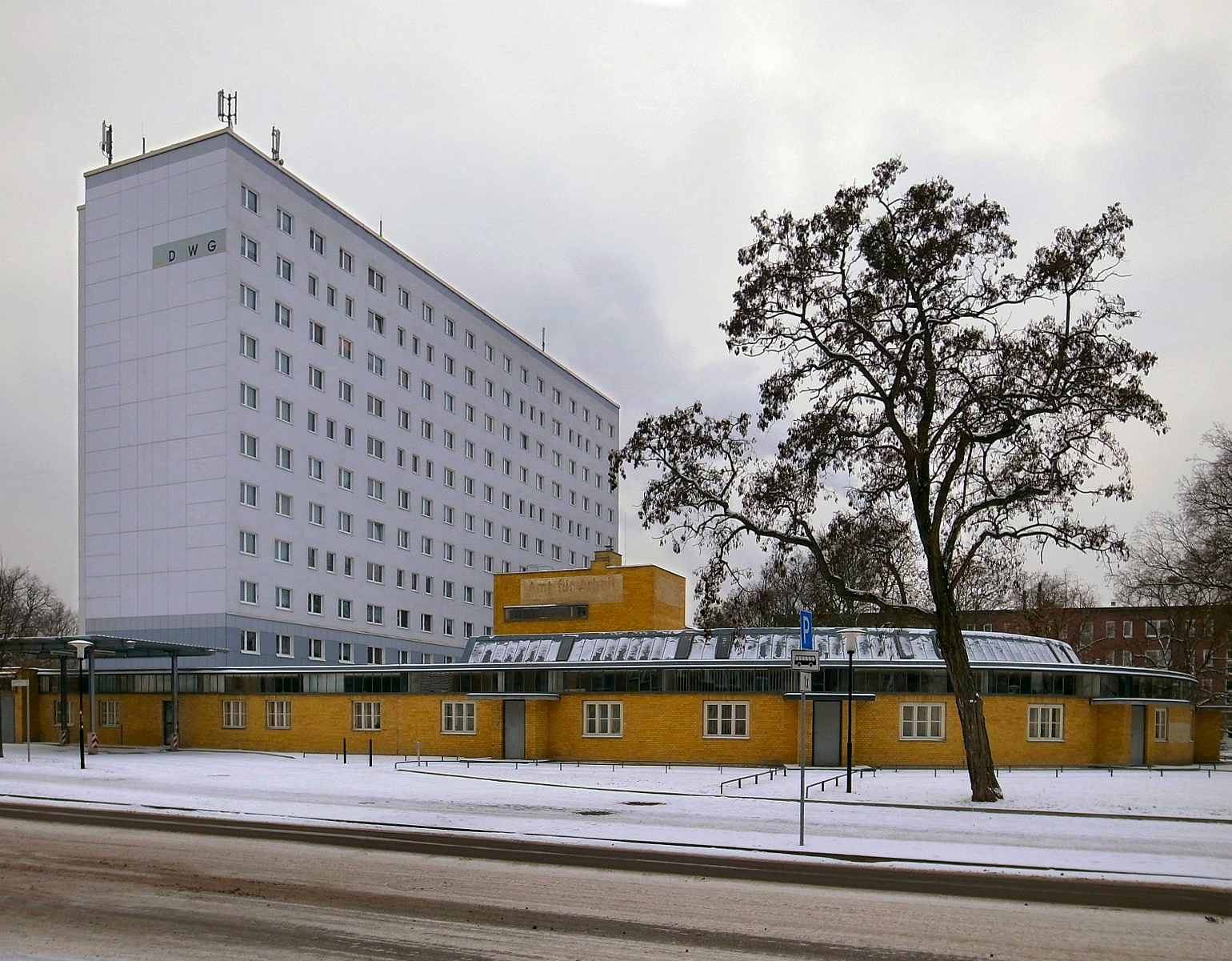 Historisches Arbeitsamt von Walter Gropius in Dessau, Rundbau von 1928. Sanierung 2002–2003